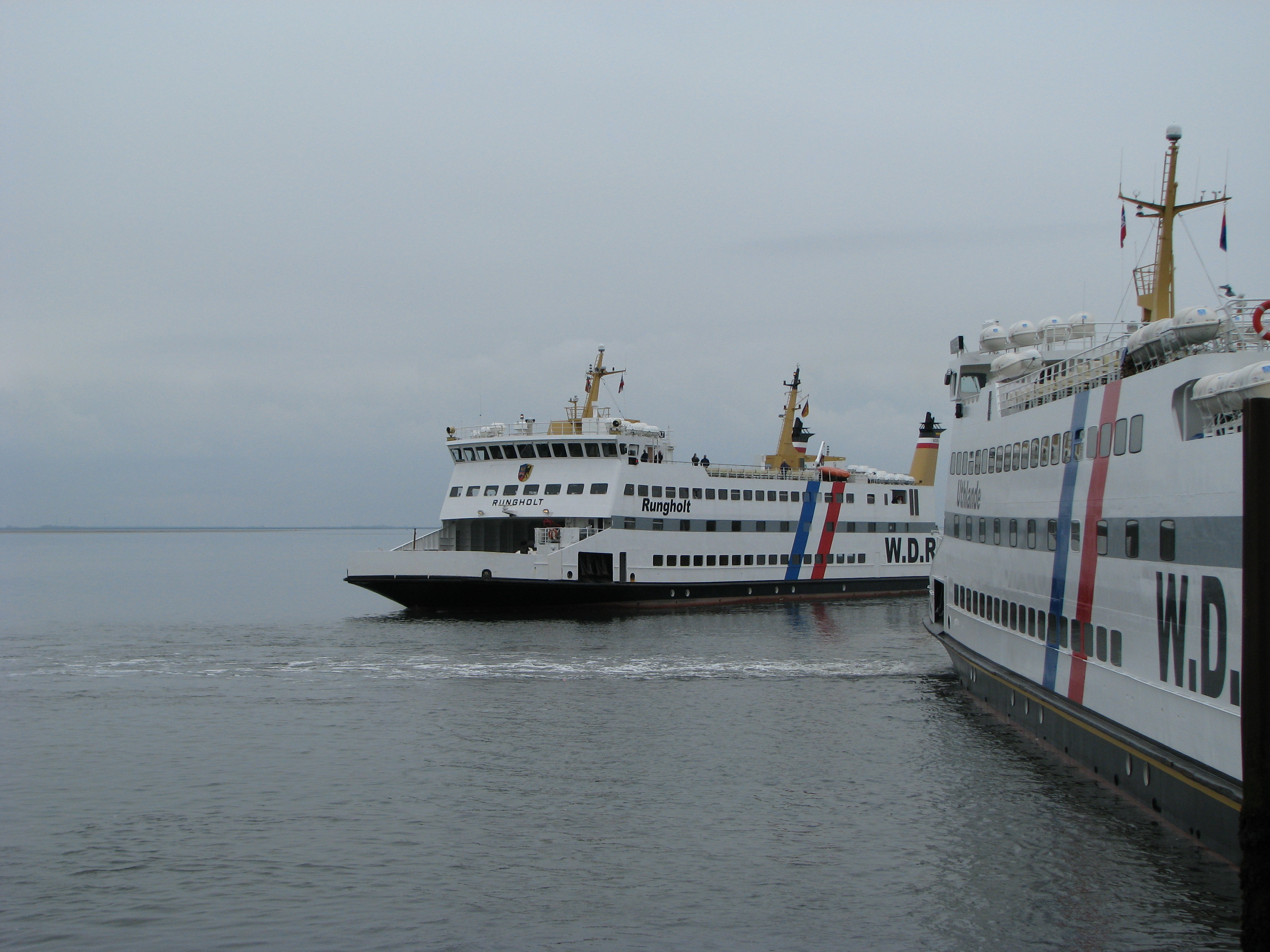 Die MS Rungholt der W.D.R. läuft im Heimathafen ein, am Anleger liegt die MS Uthlande IV